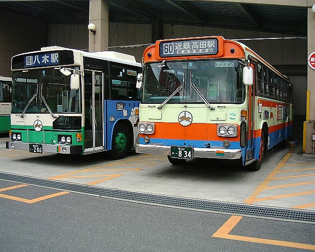 奈良交通 新旧塗色（左が新塗色、右が旧塗色） 五條バスセンターにて 左側車両 日野自動車 U-HU2MPAA、右側車両 日野自動車 K-RC321P